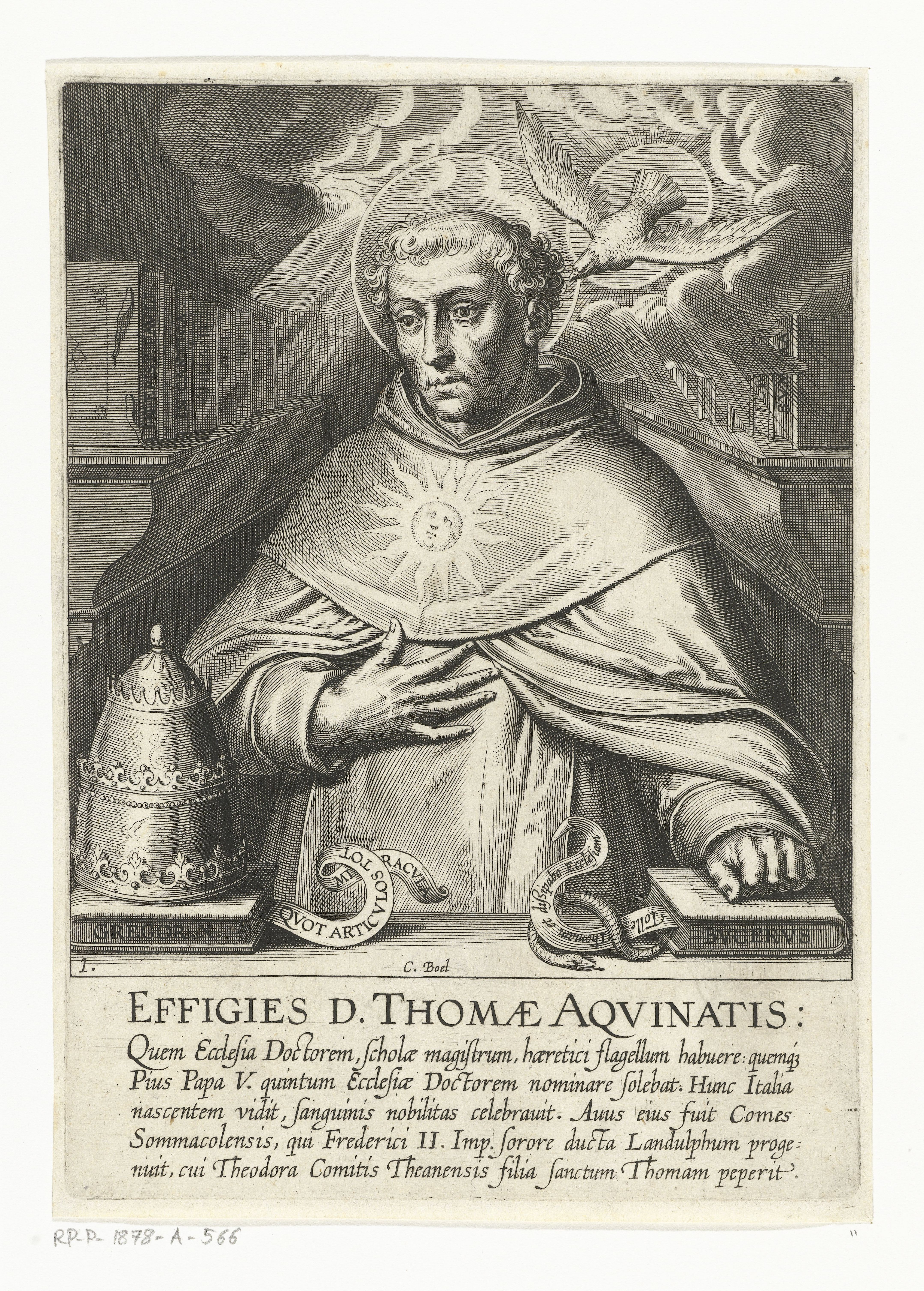 Saint Thomas d'Aquin est dans une bibliothèque, il porte l'habit dominicain. Une colombe lui souffle la Parole de Dieu dans l'oreille.